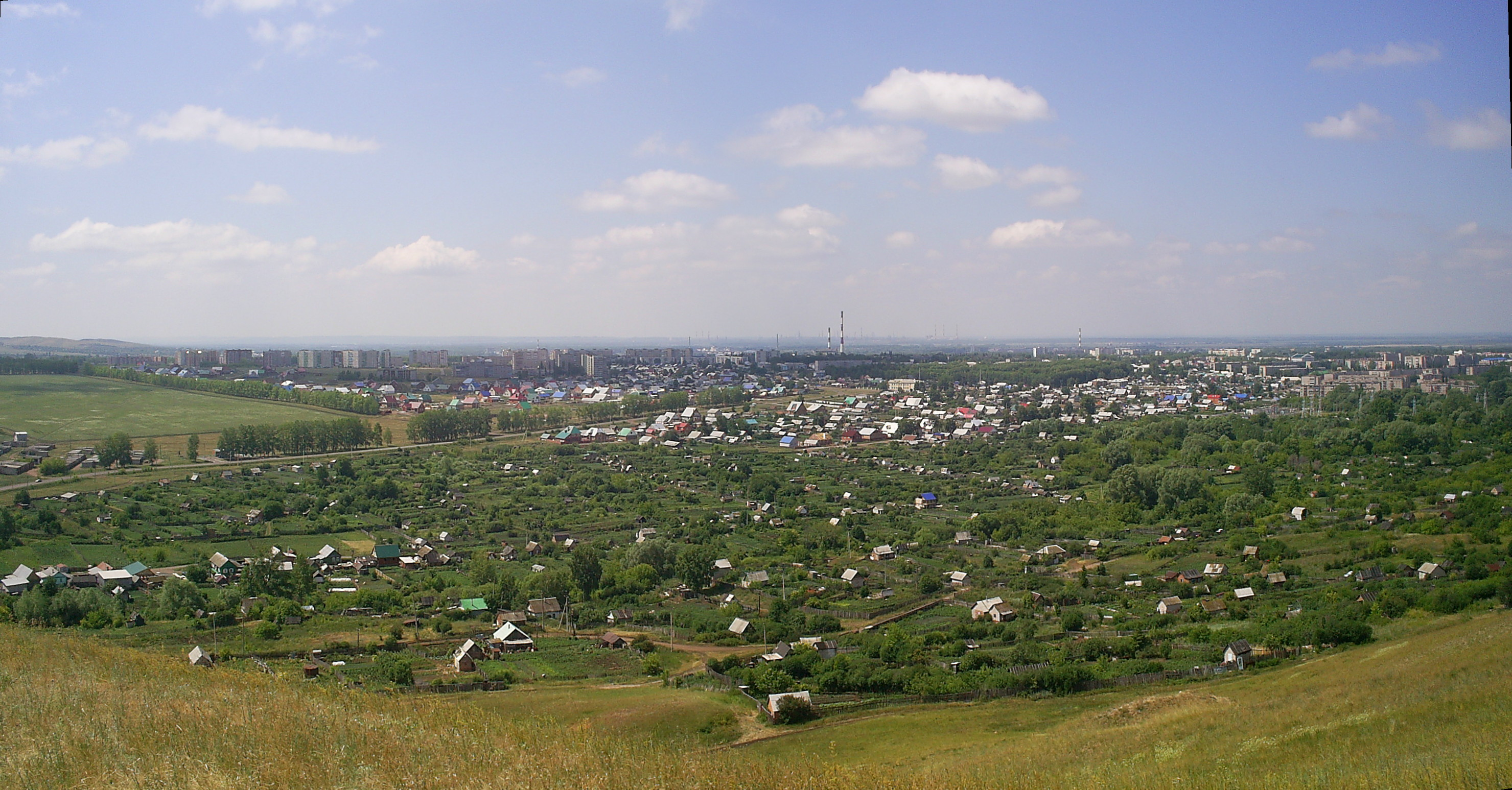 Панорама города Ишимбая с горы Алебастровой 12.07.2009